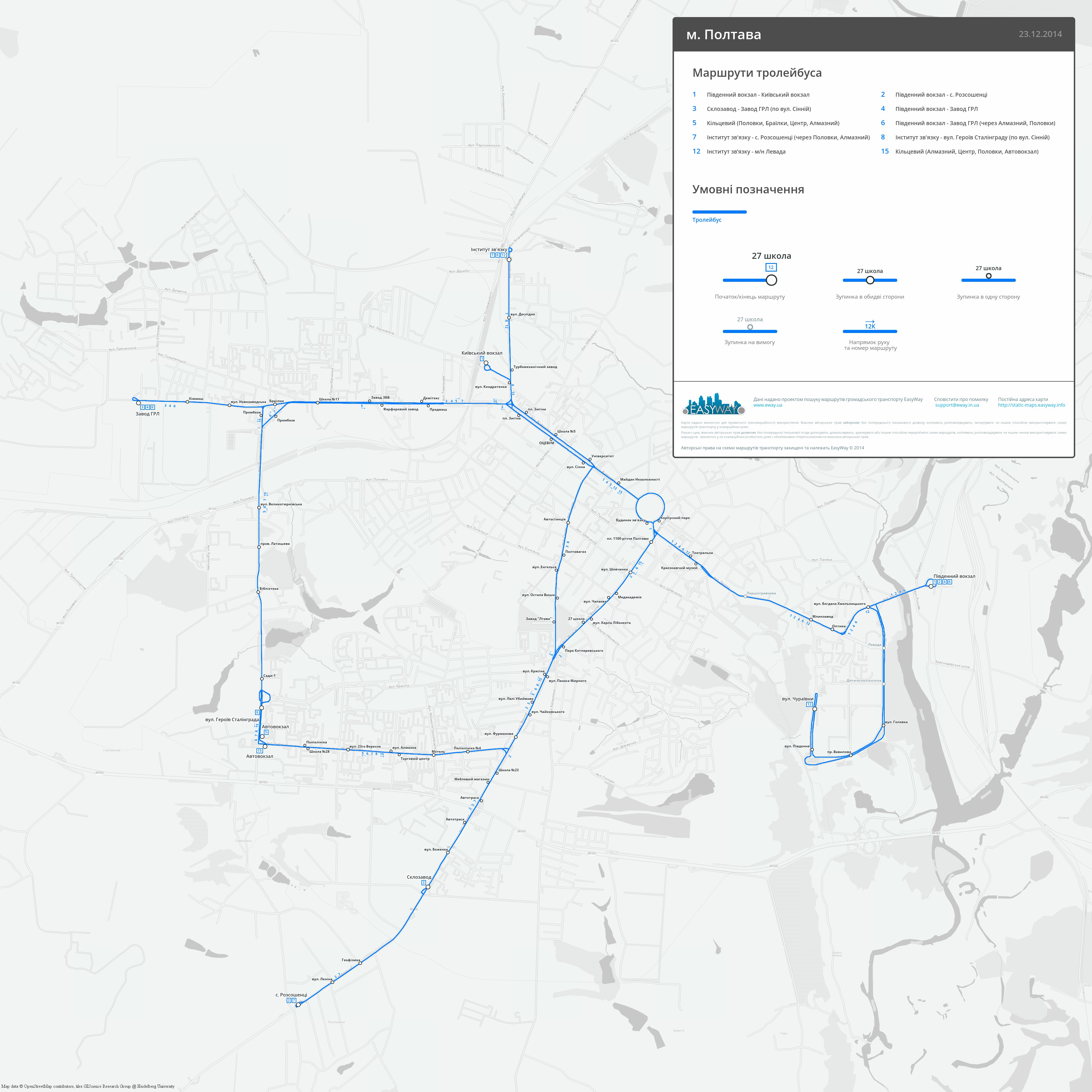 Схема тролейбусних маршрутів міста Полтава